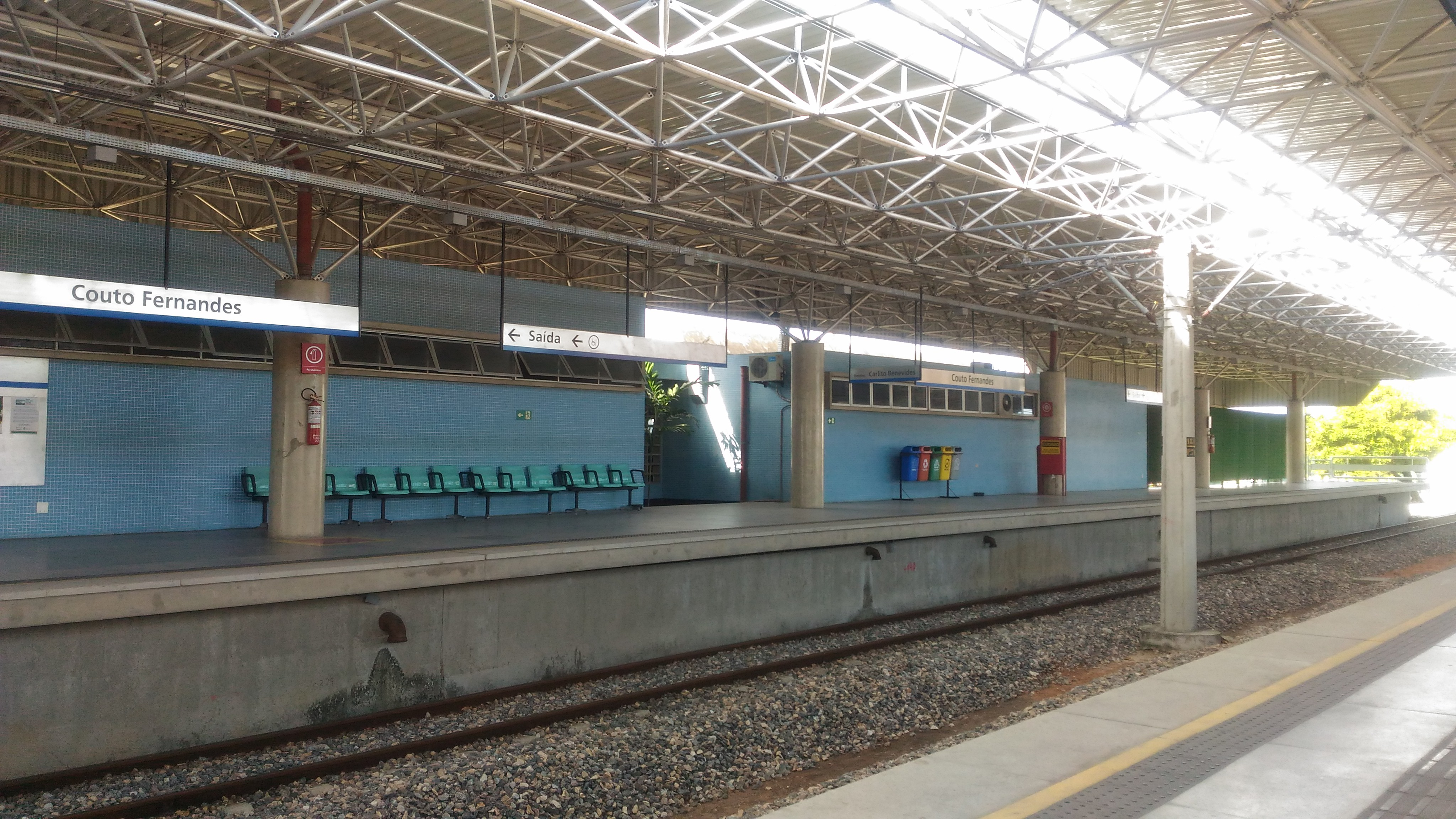 Plataforma da estação Couto Fernandes.